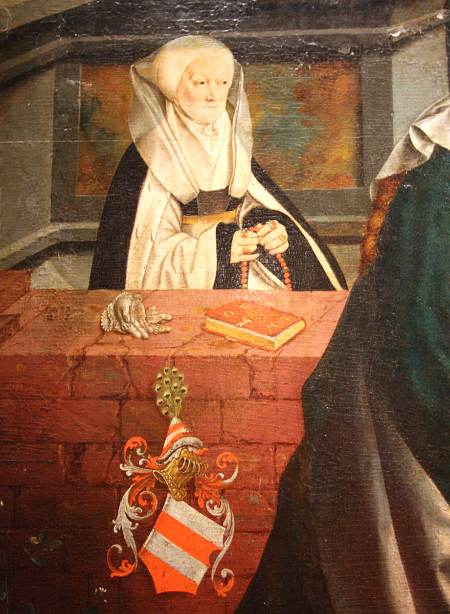 Sonderausstellung „Gold vor Schwarz“ auf Zollverein, Exponate der Essener Domschatzkammer in der ehemaligen Kohlewäscherei. Detail eines Tafelbildes von Bartolomäus von Bruyn d.Ä., Portrait Margaretha von Beichlingen